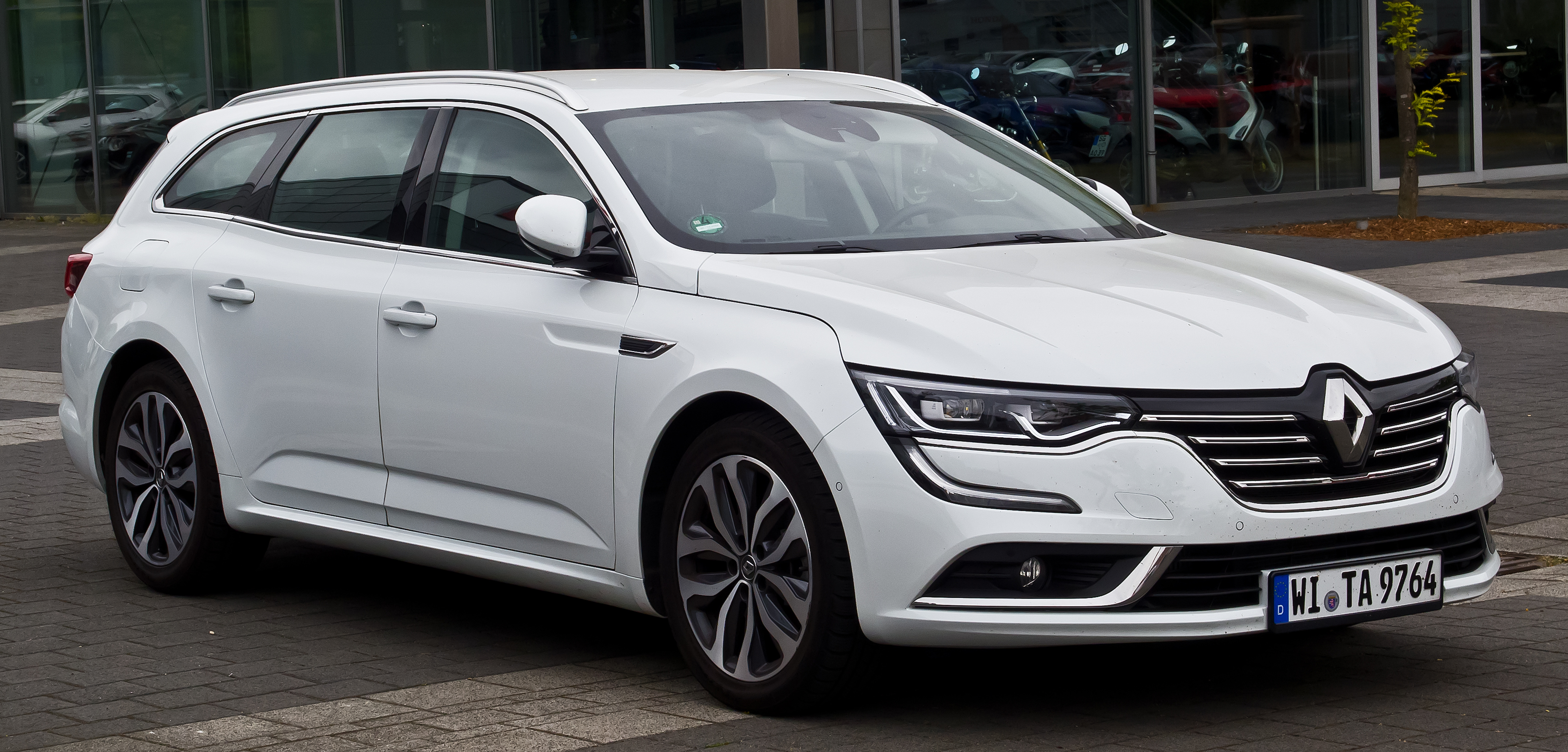 Renault Talisman Grandtour Intens ENERGY dCi 160 EDC